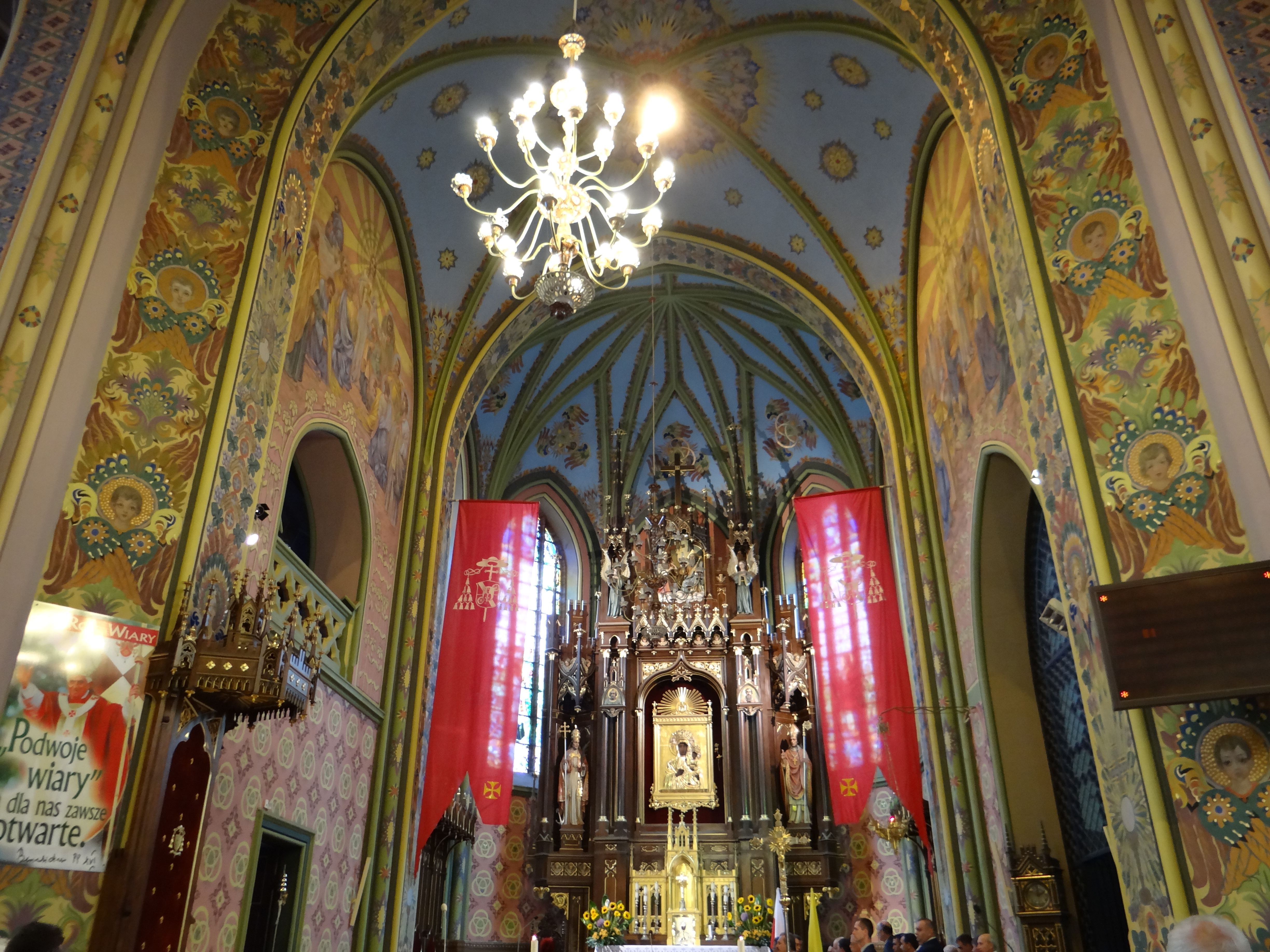 Wnętrze kościoła Świętej Trójcy w Myszyńcu - ołtarz główny